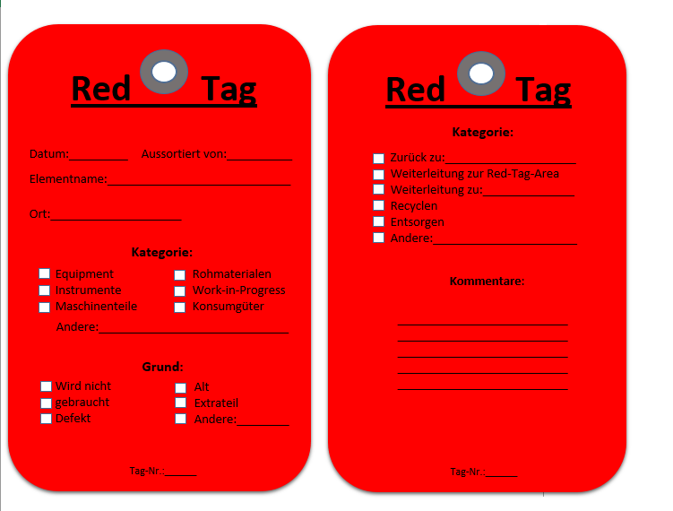 Beispiel eines "Red Tags", wie man sie auch im Handel erwerben kann.